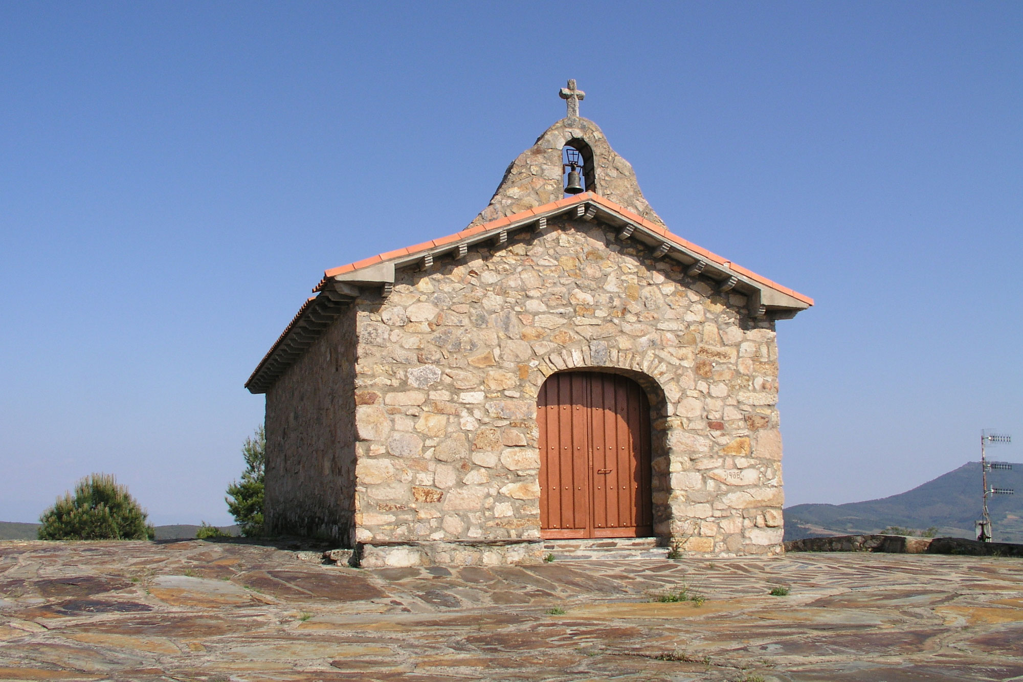 Ermita de Los Santitos. Torrecilla de los Ángeles (Cáceres, España).